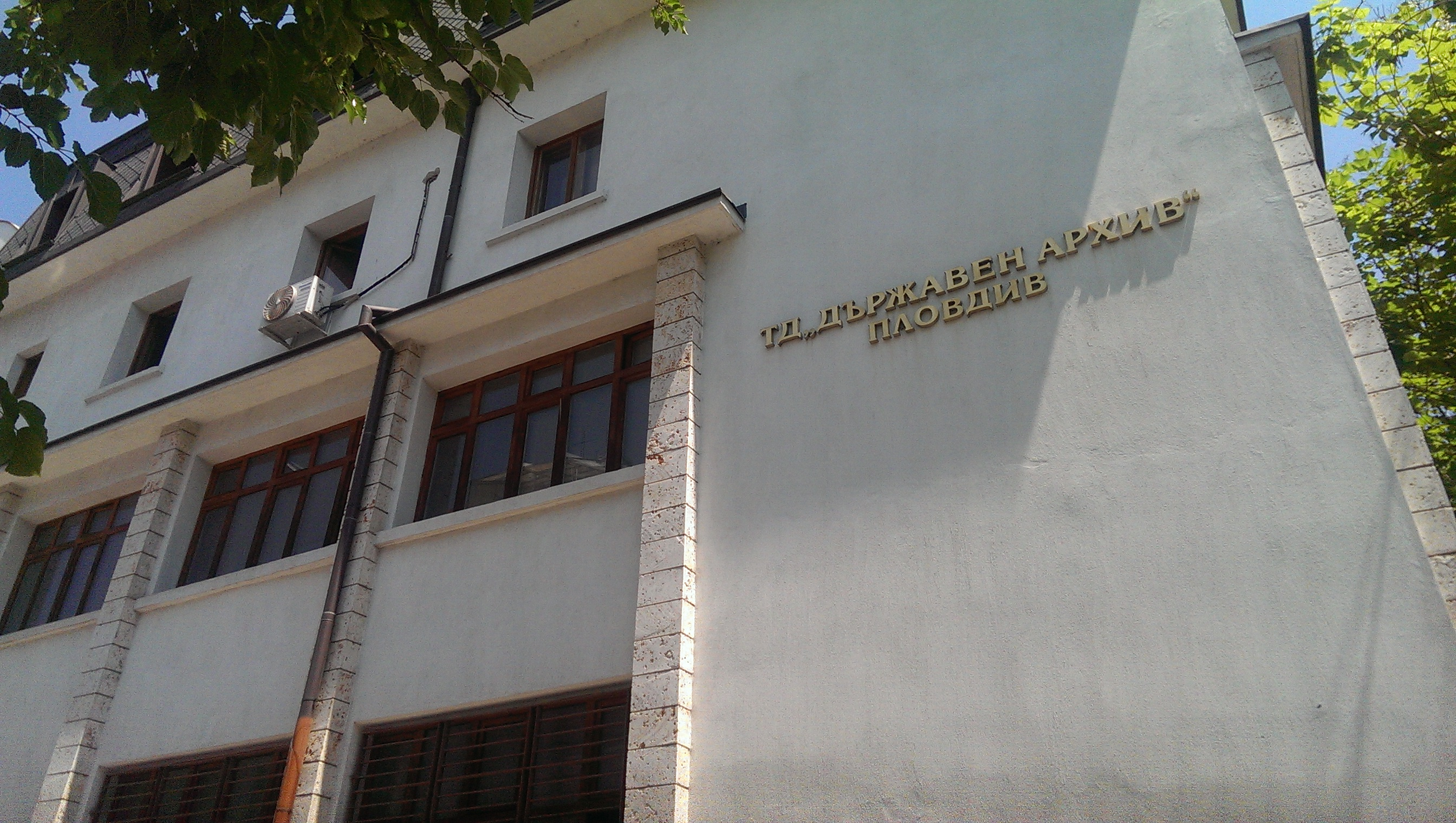 Сградата на Държавен архив - Пловдив